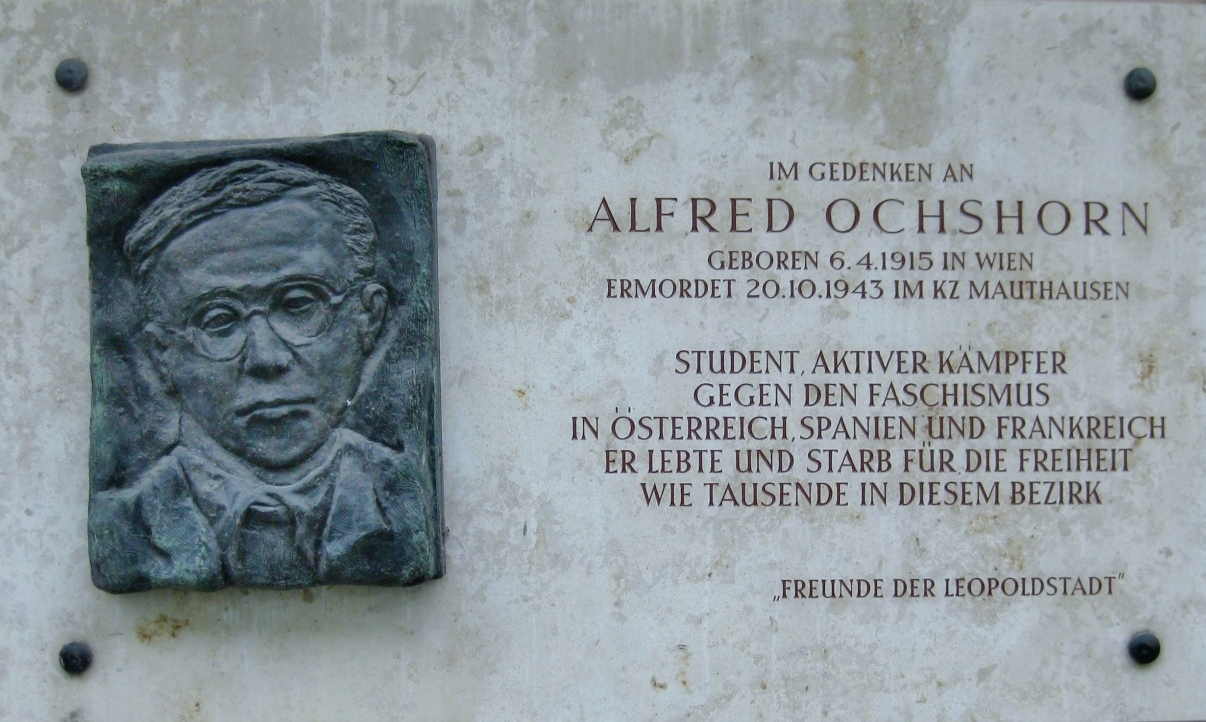 1020 Haidgasse 2 - Karmelitermarkt - Alfred Ochshorn-Gedenktafel